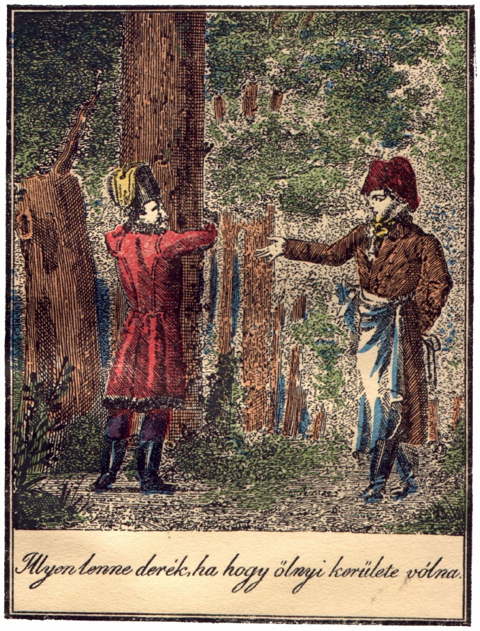 A Lúdas Matyi 1817-es bécsi kiadásából Göbwart F. S. egykorú, színes illusztrációja: Matyi olasz ács képében.